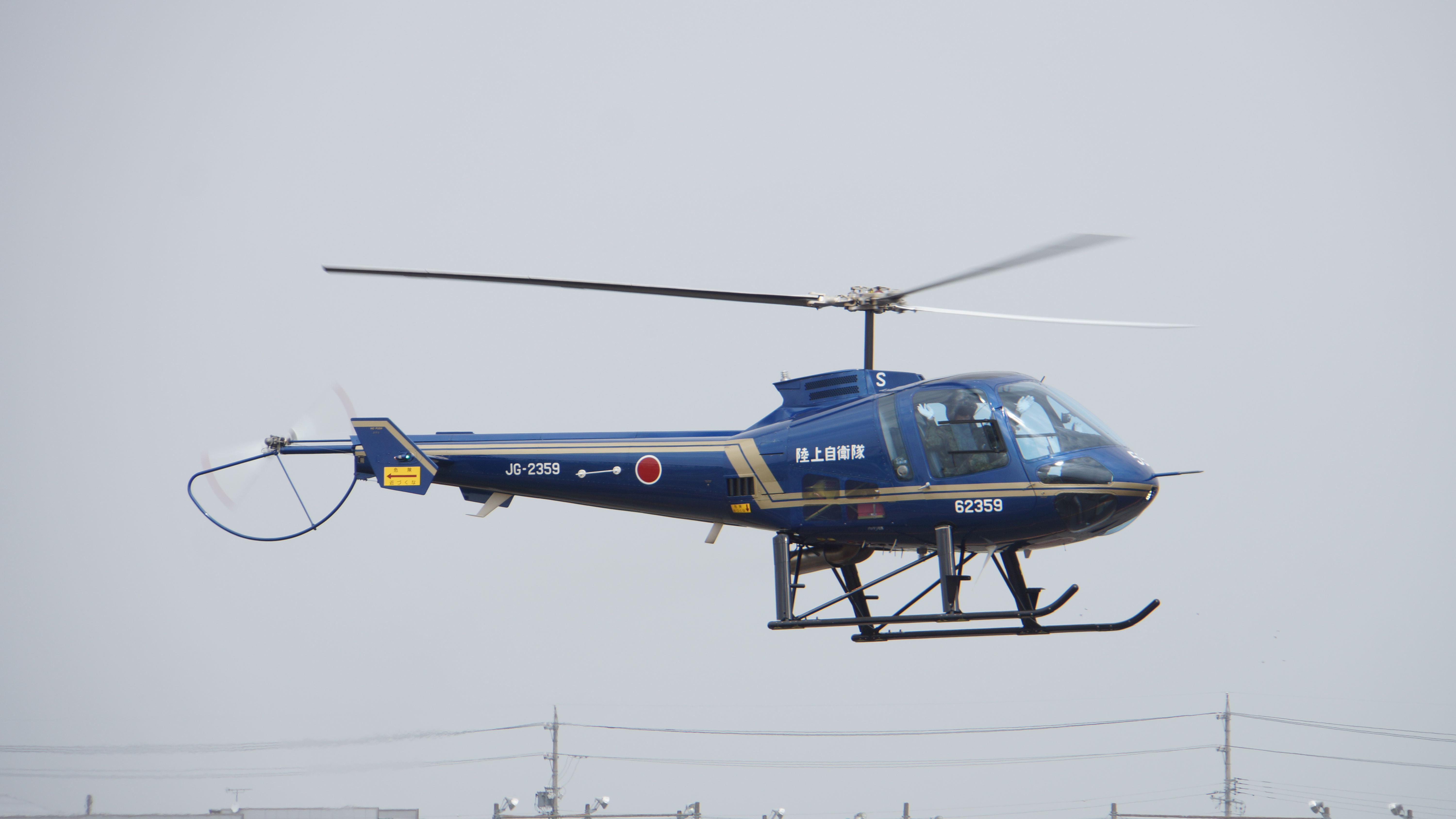 陸上自衛隊 TH-480B練習ヘリコプター（62359号機）。2016年10月2日 明野駐屯地にて。